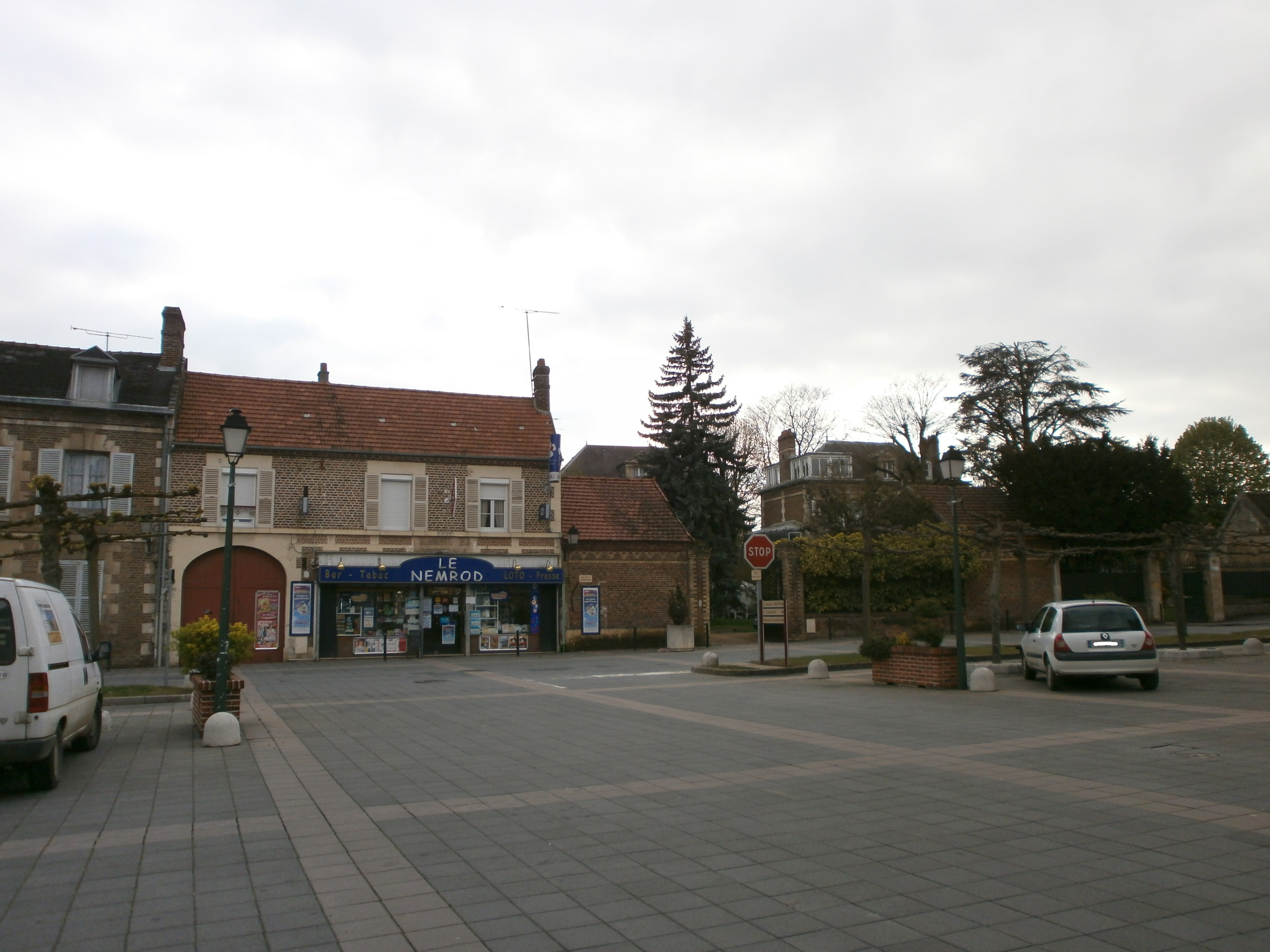 Le centre ville du Meux